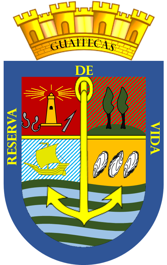 Escudo de la comuna de Guaitecas (Chile)